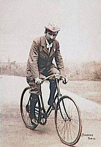 Gaston Rivierre (1862-1942), coureur cycliste français. Photo Charles Barenne